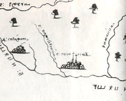 Фрагмент карты Стародубского полка начала XVIII века.